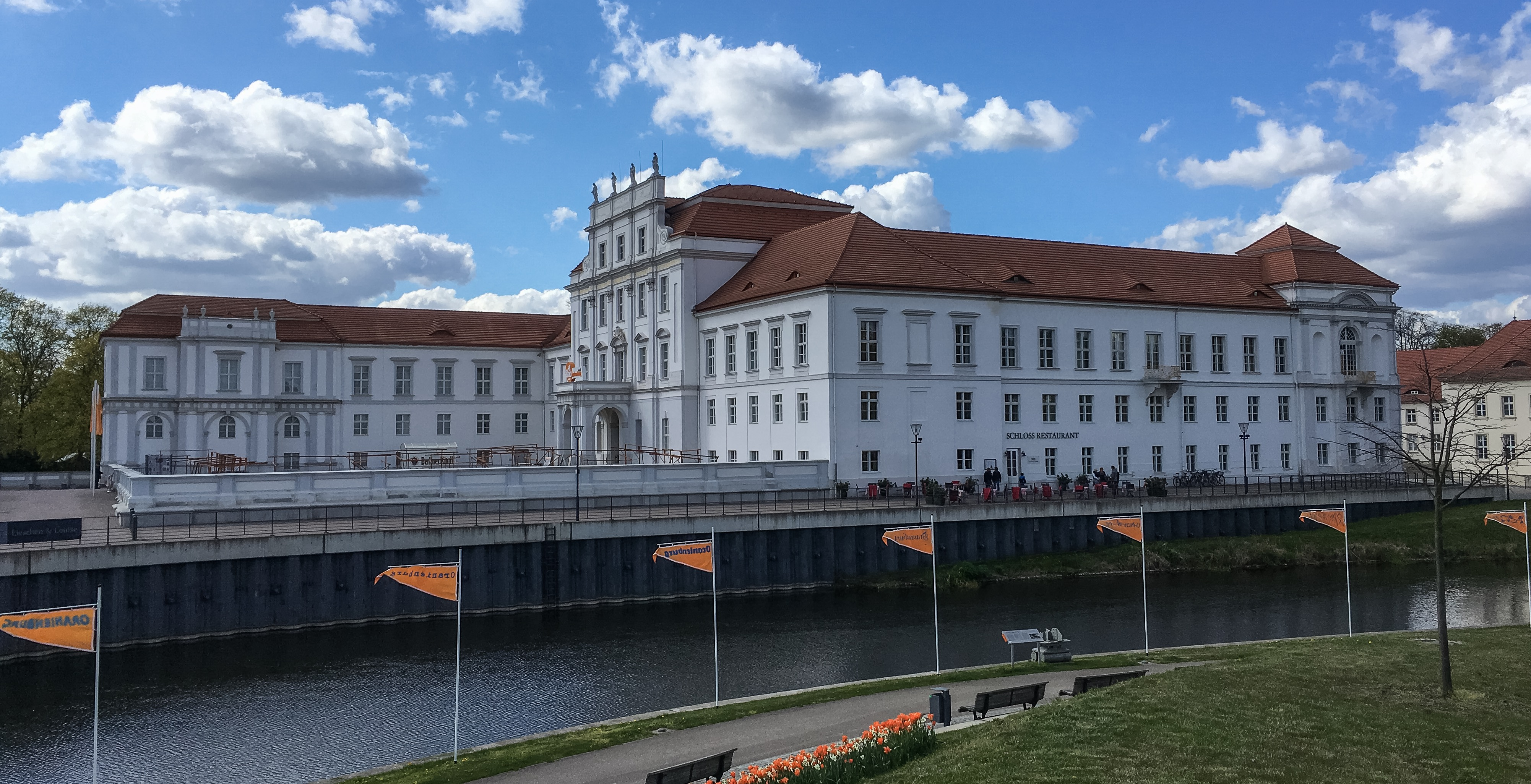 Schloss Oranienburg, April 2016